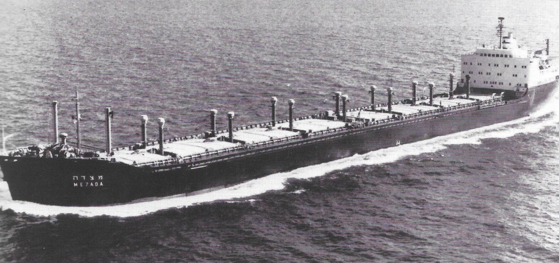 אוניית צובר מצדה בלב ים